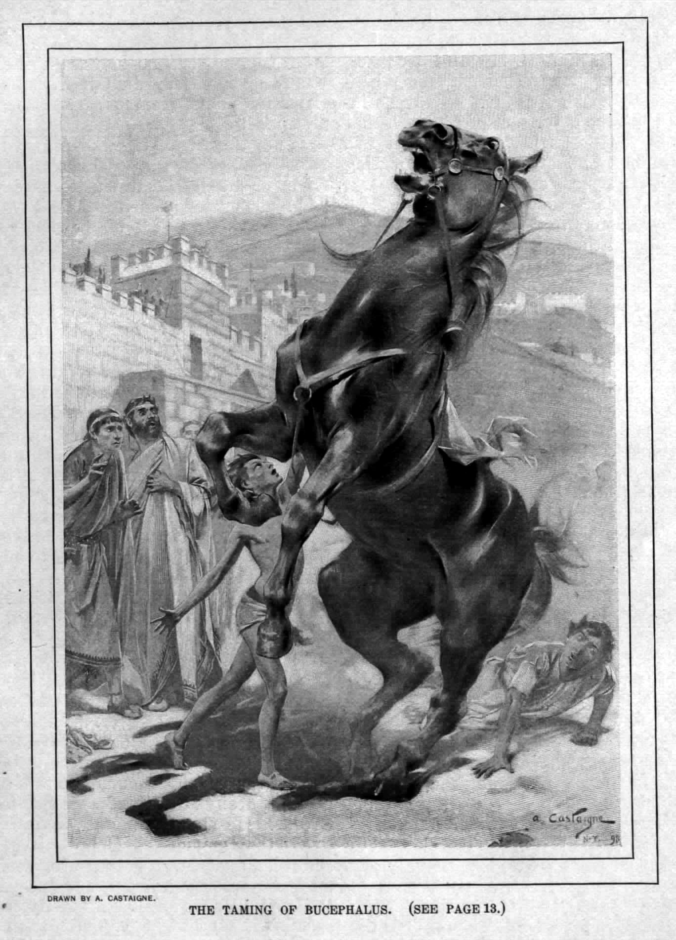 Alexander old drawings